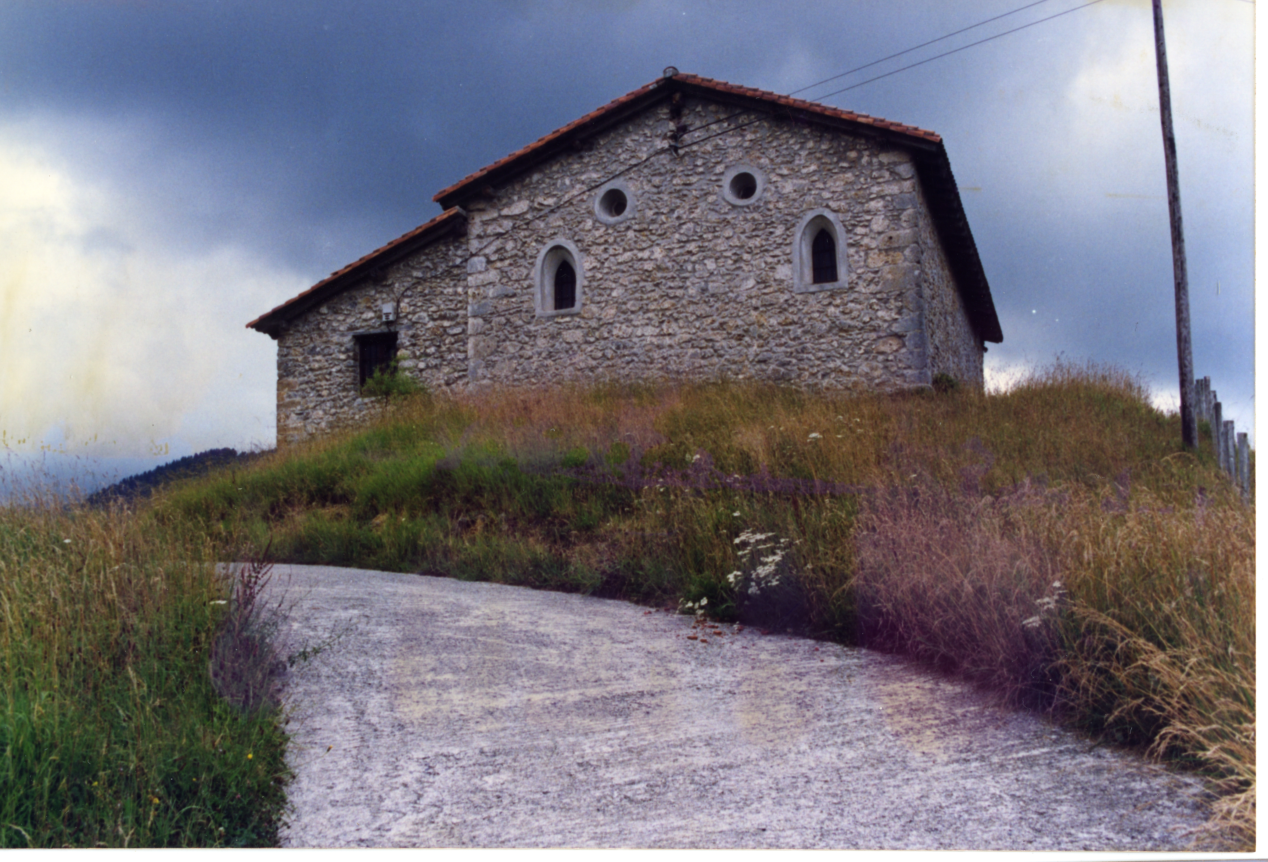 Uztailak 18, Santa Marina eguna. Aiurri 18 zbk. 6. orr.